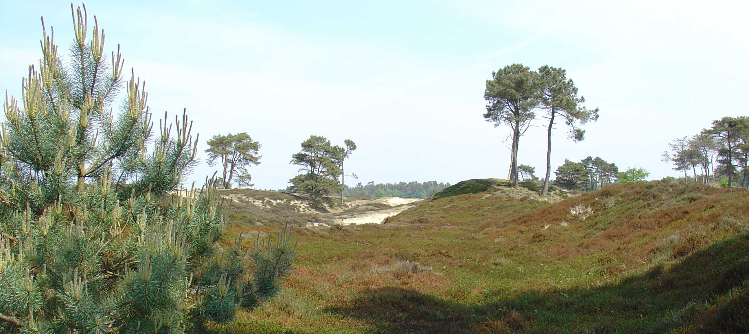 Het Aekingerzand, stuifzandgebied in het Drents-Friese Wold